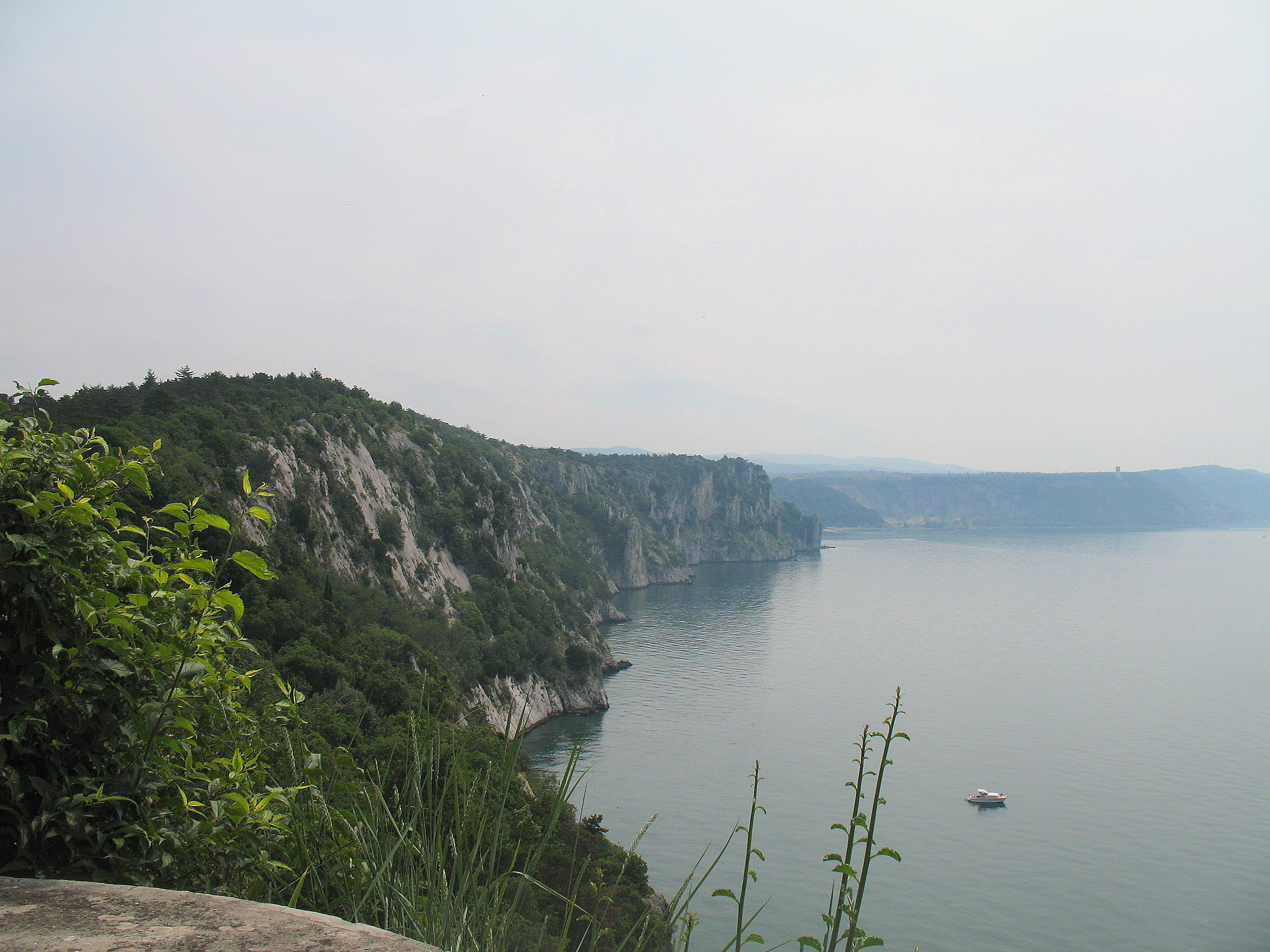 Sistiana, frazione di Duino-Aurisina, provincia di Trieste, Friuli-Venezia Giulia, Italia.